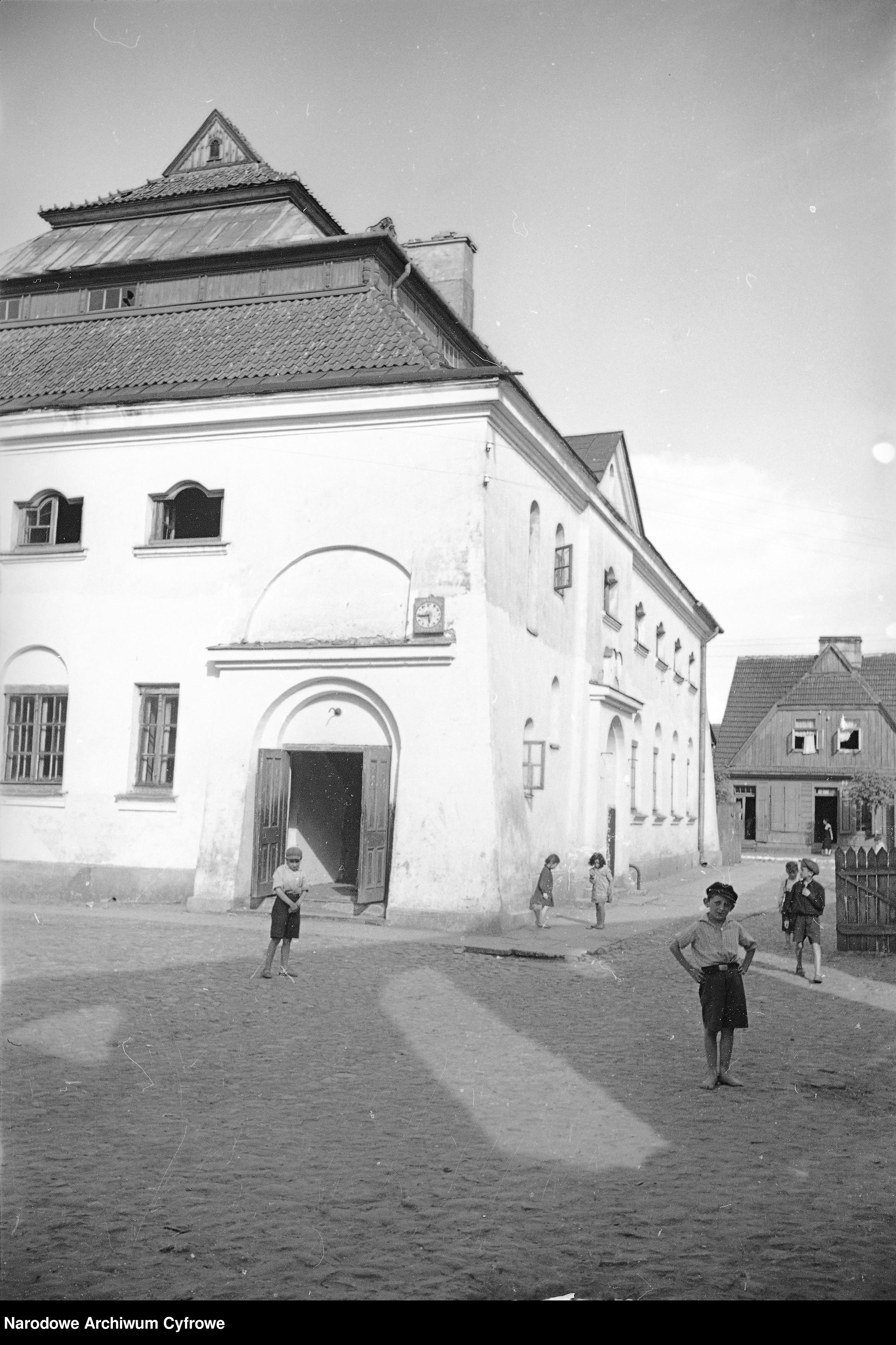 synagoga